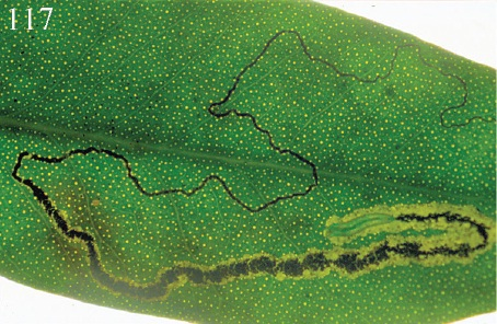 Pectinivalva brevipalpa